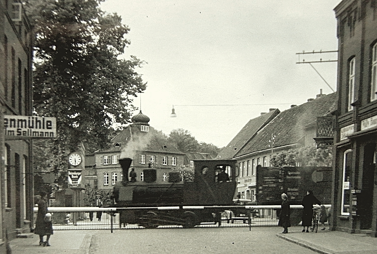 Stadt und Hafen Bahn Boizenburg